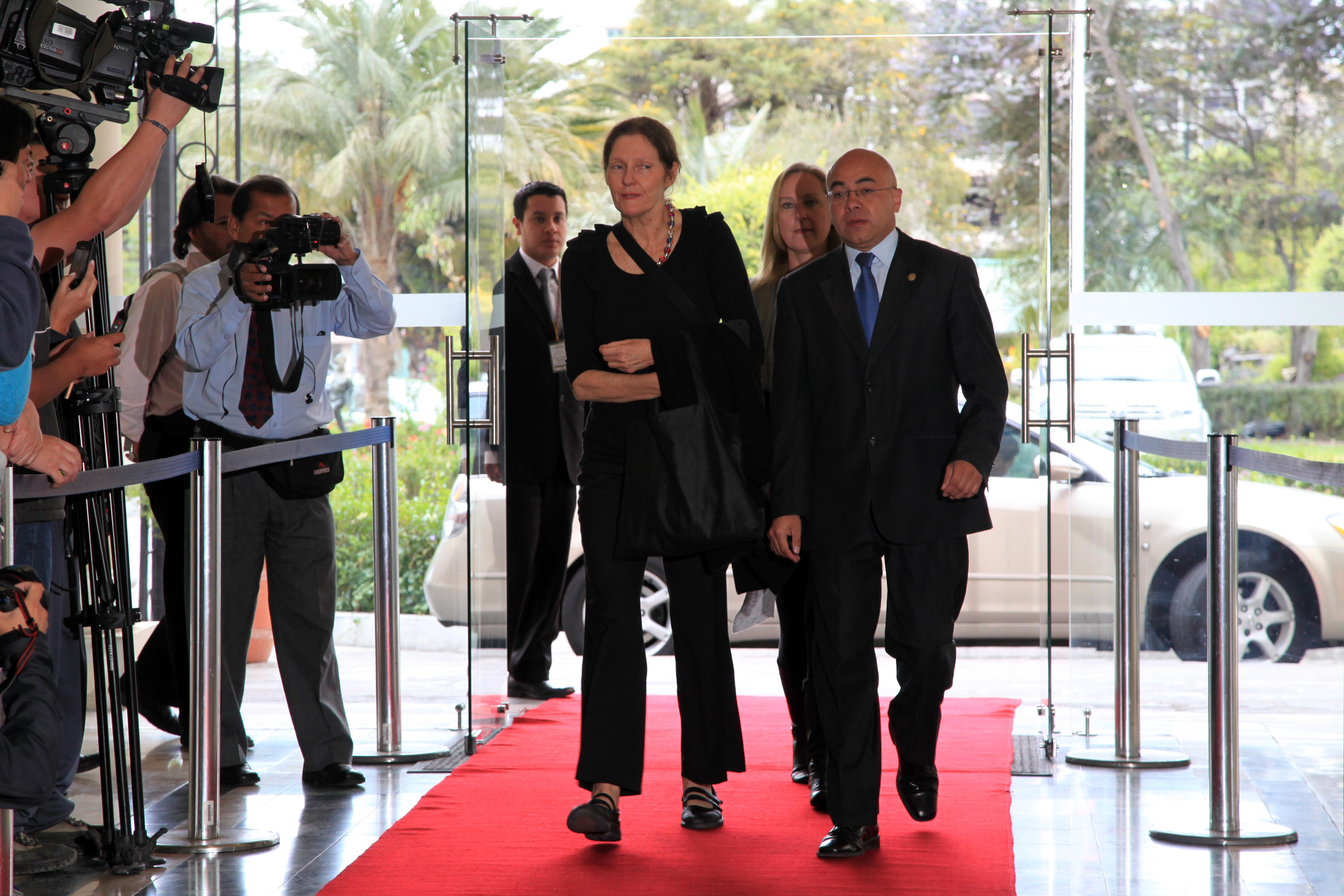 Quito (Ecuador), 30 de Julio 2012. Esta mañana la señora Christine Assange, madre de Julian Assange, ingresó a la Cancillería para entrevistarse con el Canciller Ricardo Patiño. Foto: Xavier Granja Cedeño - Ministerio de Relaciones Exteriores, Comercio e Integración.